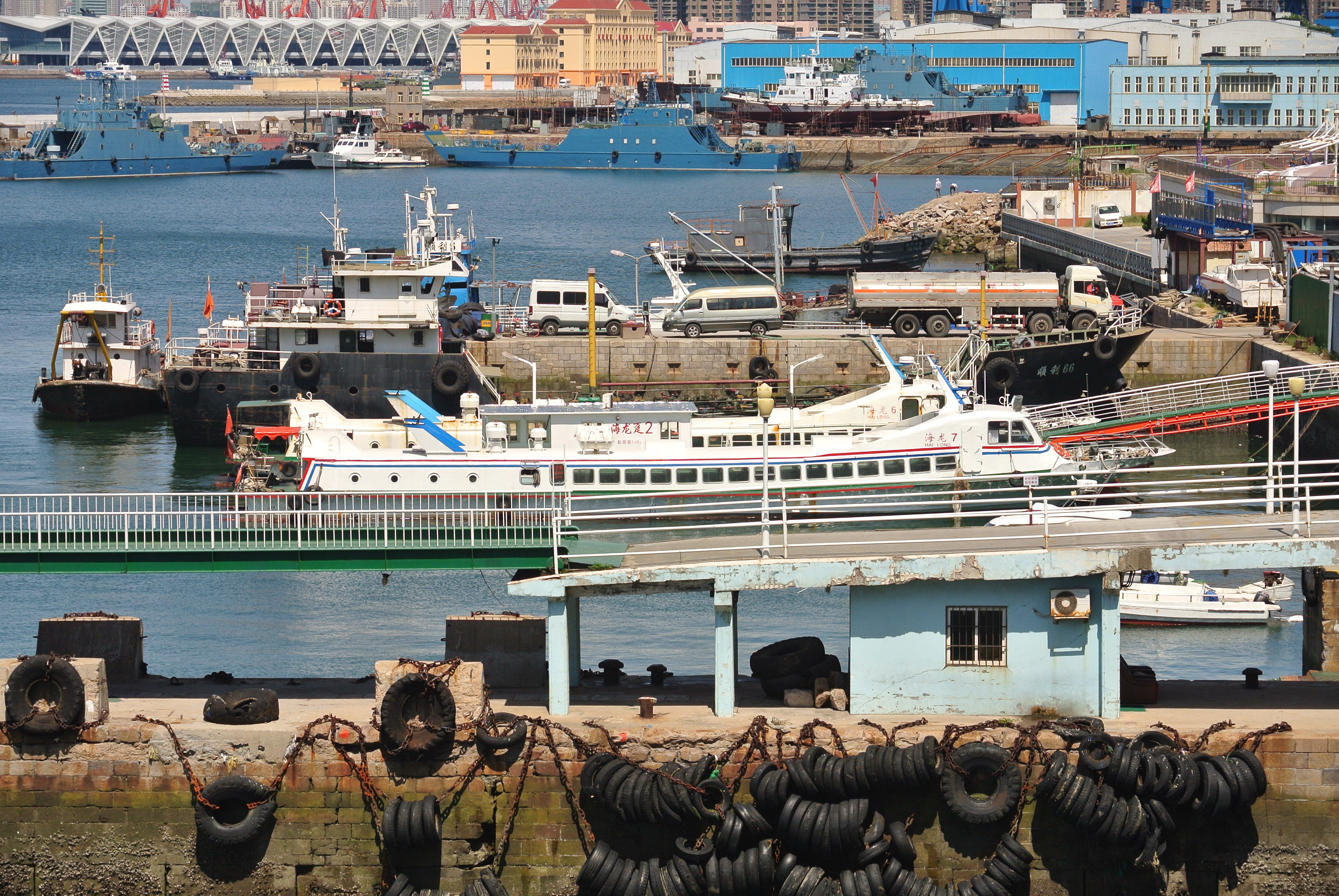 停泊在青岛轮渡码头的船只